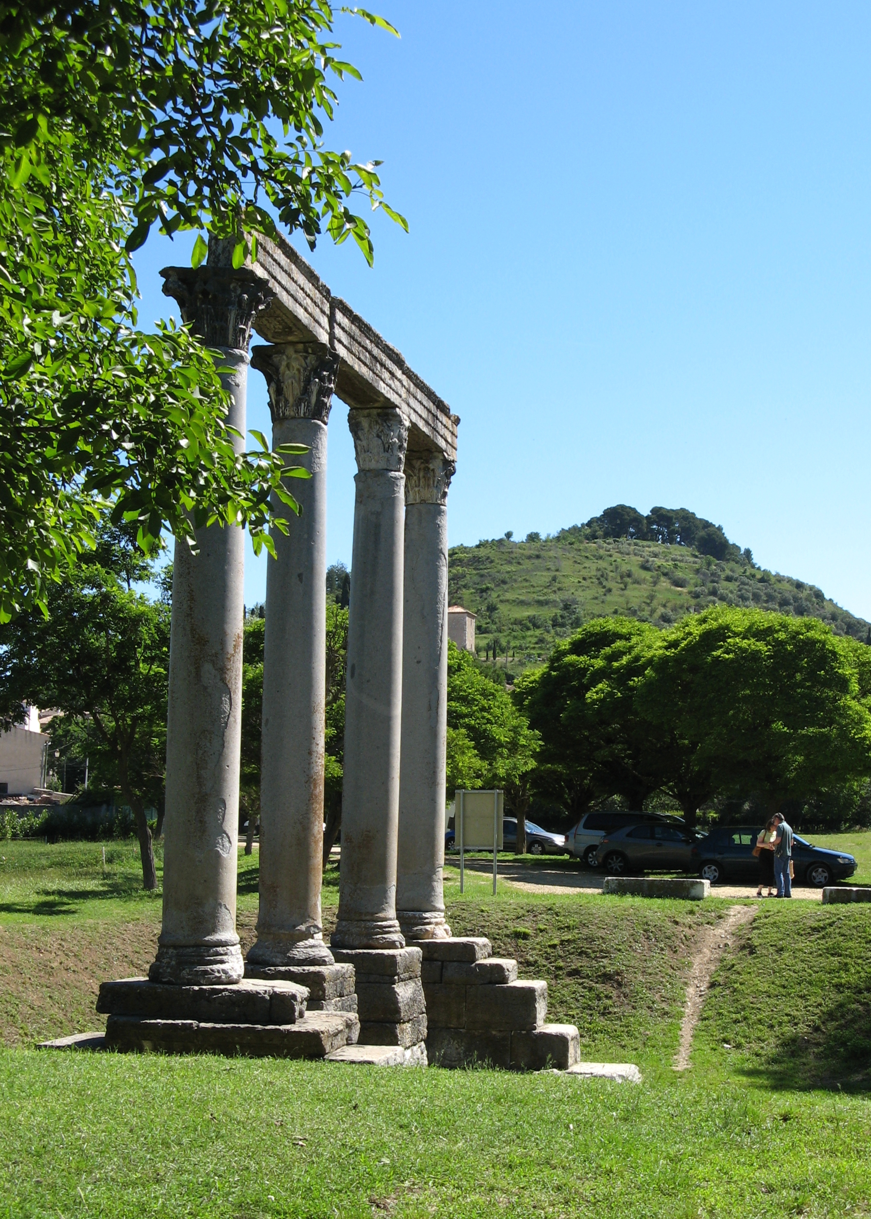 Riez, Alpes-de-Haute-Provence, Provence-Alpes-Côte d' Azur, Frankrijk. Restanten - reconstructie - van de Romeinse tempel van Apollo die dateert uit de laatste jaren van de Ie eeuw v.C. Op de achtergrond de heuvel Saint-Maxime - oppidum.